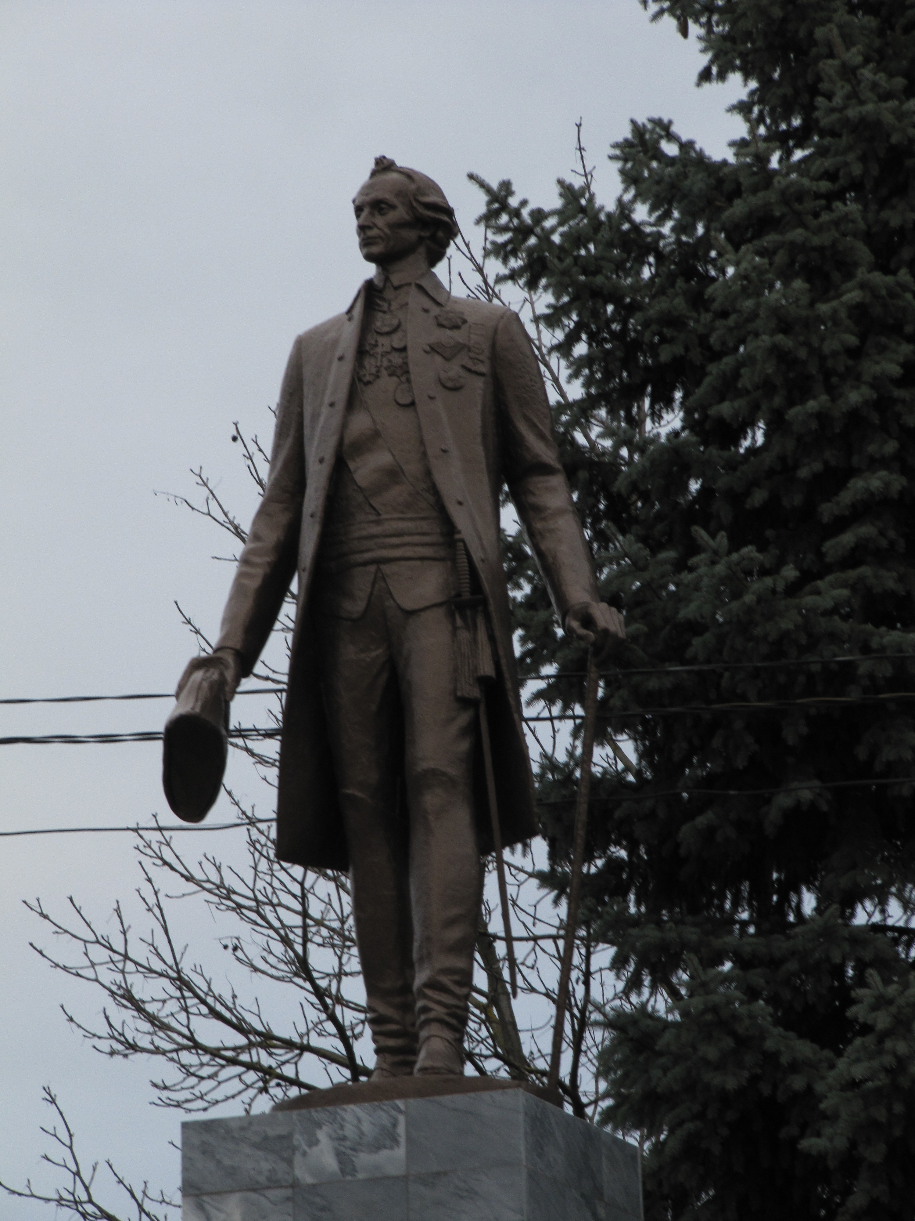 Памятник Суворову в станице Ленинградская, Краснодарский край